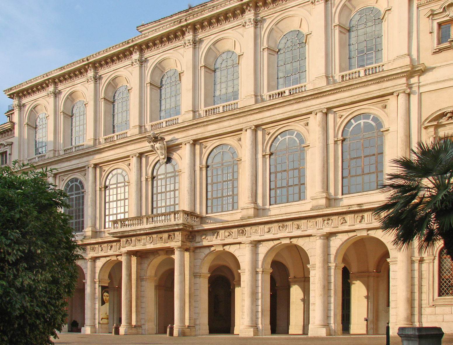 La façade centrale du palais Barberini au coucher du soleil Le palais a été conçu en 1625 par Carlo Maderno, à la demande du Cardinal Maffeo Barberini, devenu Pape en 1623 sous le nom d'Urbain VIII. La forme du bâtiment est celle d'une vaste villa avec deux ailes en H qui s'avancent dans des jardins. A la mort de l'architecte, Le Bernin reprend les travaux en collaboration avec Francesco Borromini. Les colonnes de la façade (Le Bernin) sont des trois ordres, dorique au rez-de-chaussée, ionien au premier étage, corinthien au deuxième étage, en pilastres. Le portique au rez-de-chaussée permet d'alléger l'allure du bâtiment. Les salles du premier étage ont toutes des plafonds peints dont celui du salon principal, oeuvre exceptionnelle pour sa taille et sa composition de Pierre de Cortone (Le Triomphe de la Divine Providence). Le palais accueille aujourd'hui la galerie nationale d'art ancien (Galleria nazionale d'arte antica) qui comprend des oeuvres très célèbres comme "La Fornarina" de Raphaël. Site officiel de la Galerie du palais Barberini